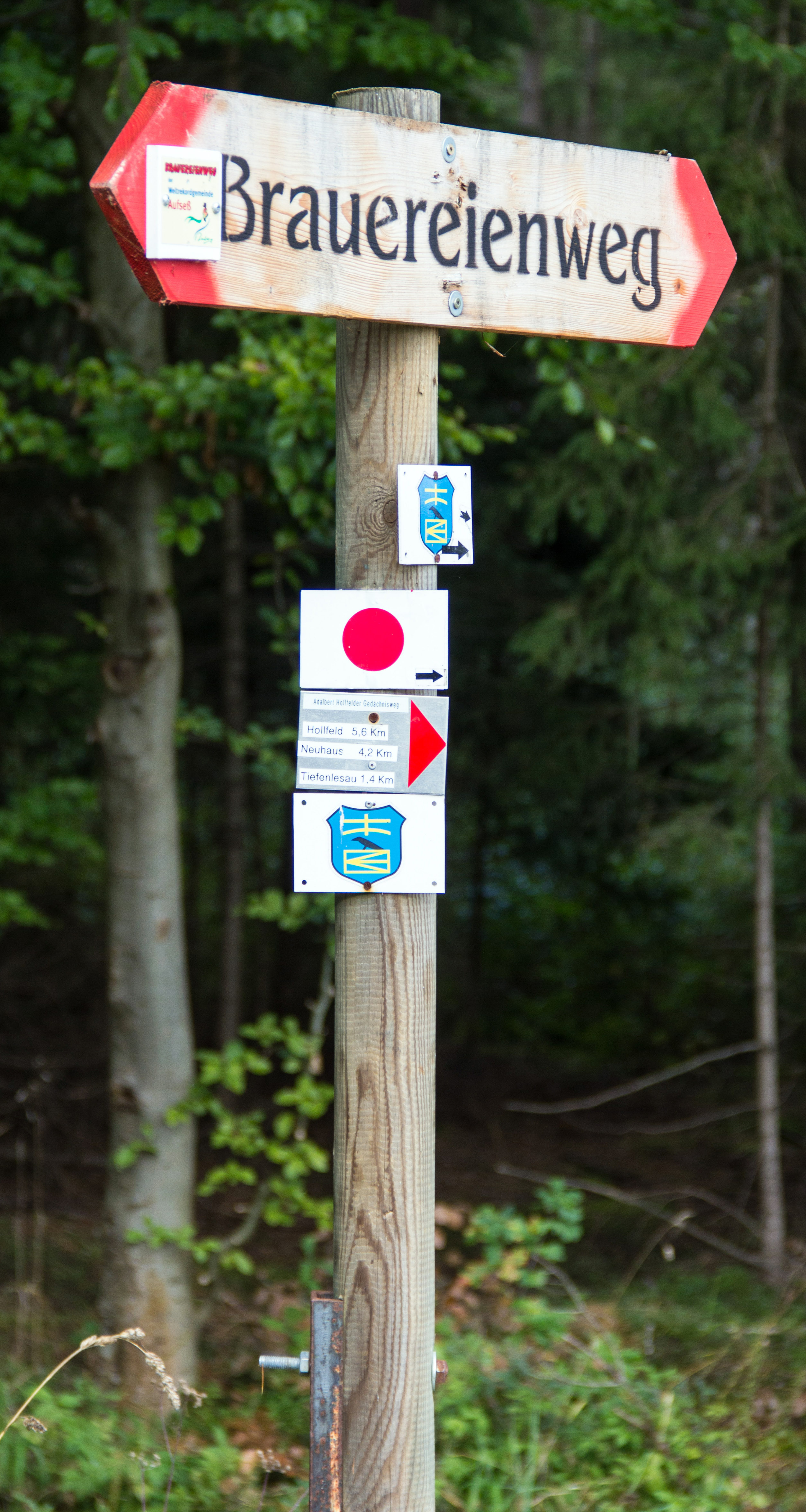 Wegweiser Brauereiweg Aufseß